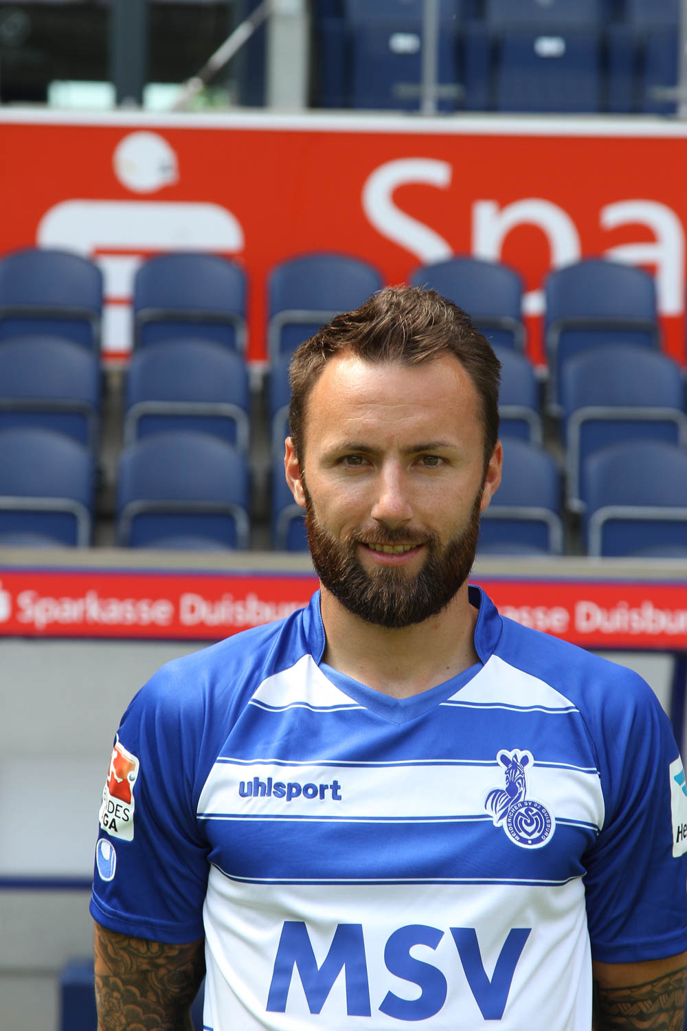 Zlatko Janjić 2015